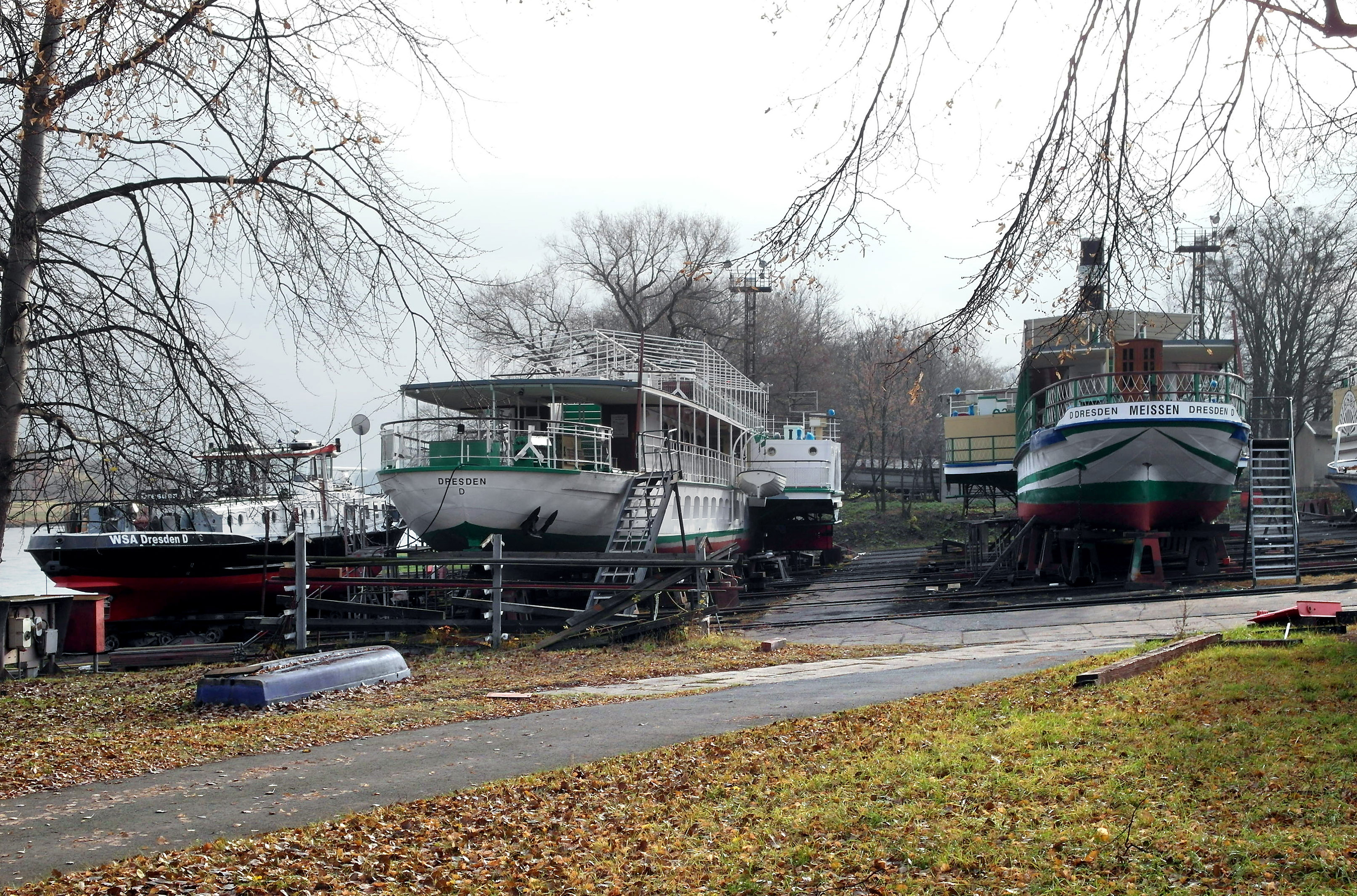 21.11.2012 01279 Dresden-Laubegast, Österreicher Straße 95 (GMP: 51.018662,13.843158): Nach längerer Vorgeschichte wurde die Schiffswerft Laubegast 1898, damals Sächsisch-Böhmischen-Dampfschiffahrts-Gesellschaft, an diesen Standort am Laubegaster Ufer an der Elbe verlegt. Bis 1929 Produktion von 8 Raddampfern der "Weißen Flotte". 1945 Bombenschäden und Demontage. Heute auf Rekonstruktion historischer Raddampfer spezialisiert. Uferzone von Westen gesehen. [SAM5026.JPG]20121121110DR.JPG(c)Blobelt